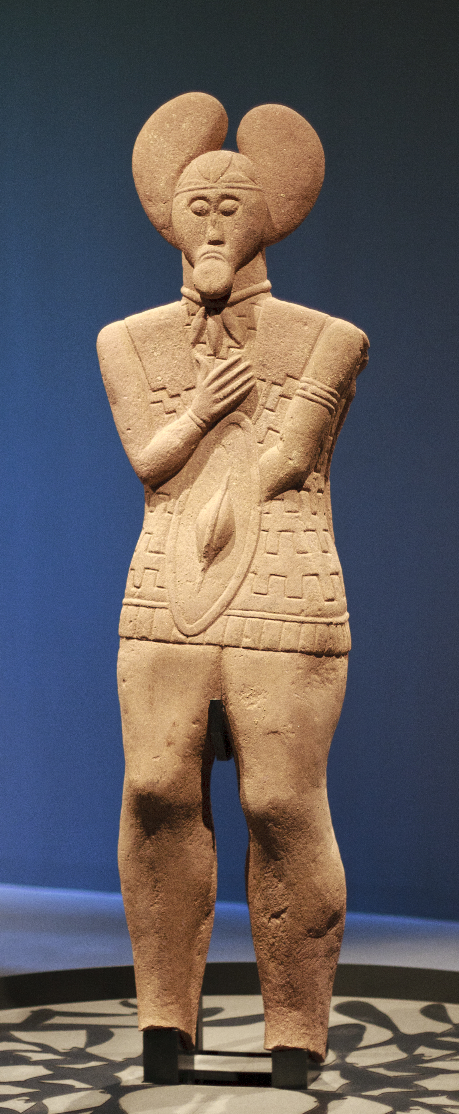 Die Statue Keltenfürst vom Glauberg im neu eröffneten Museum Keltenwelt am Glauberg.